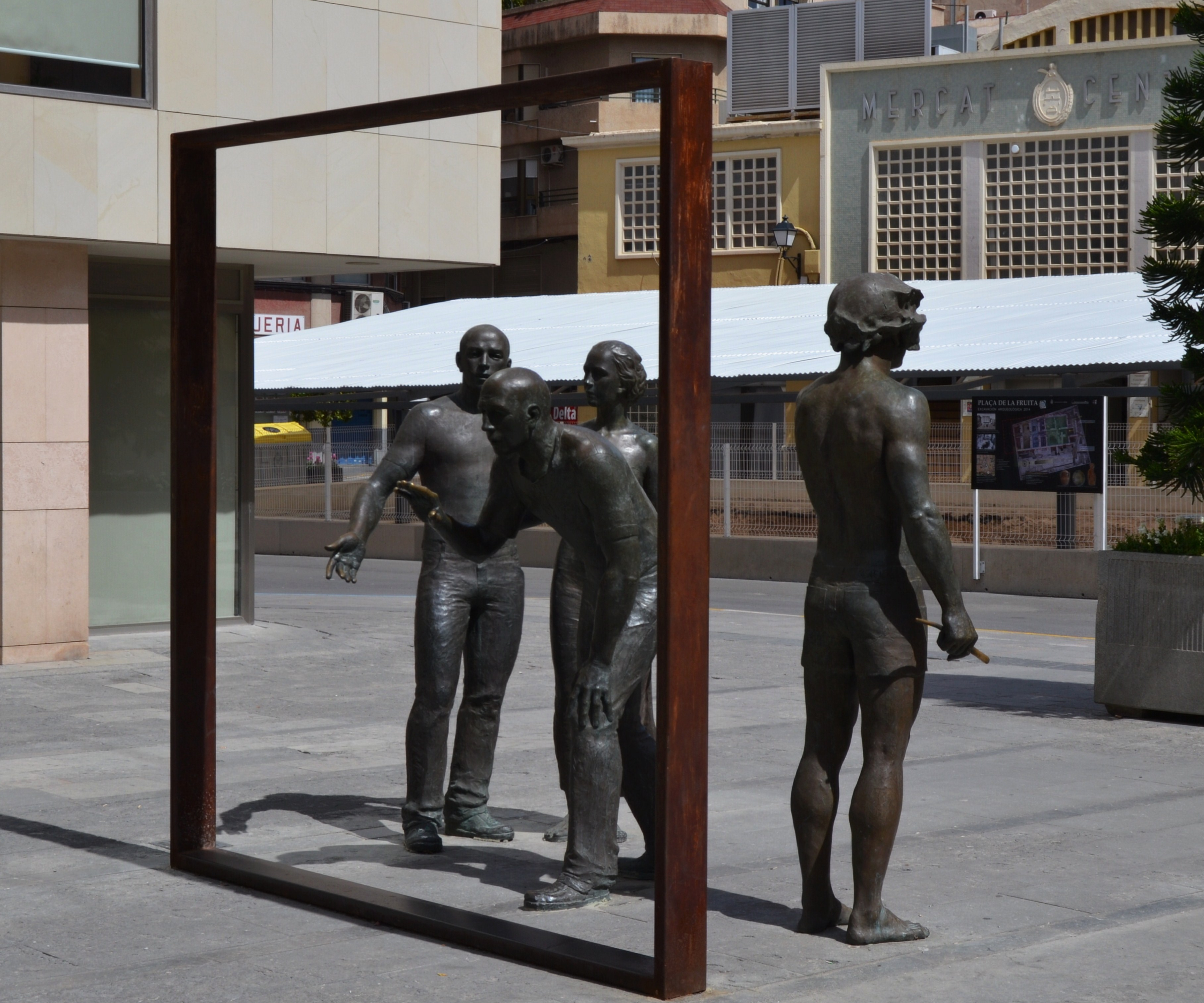 Sobre la crítica (2006), Elx.